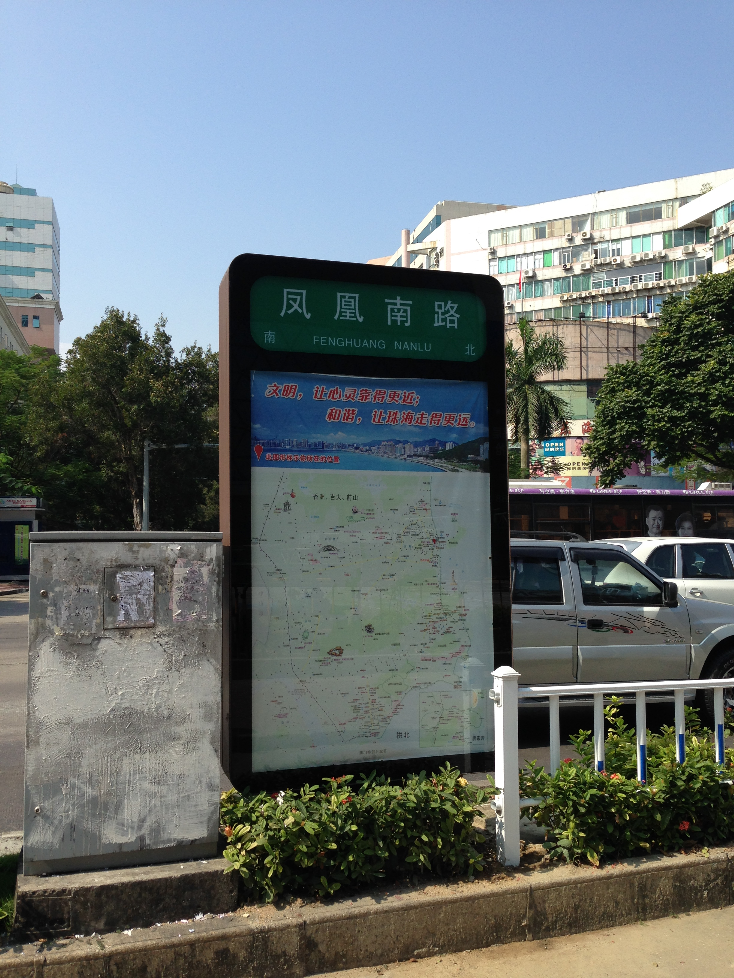 珠海凤凰南路